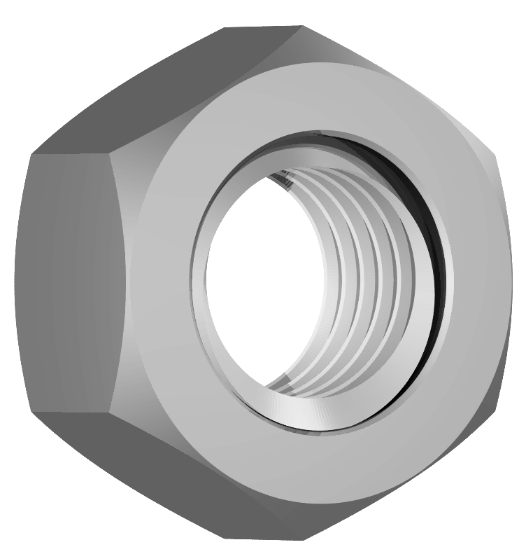 Inre gänga, mutter